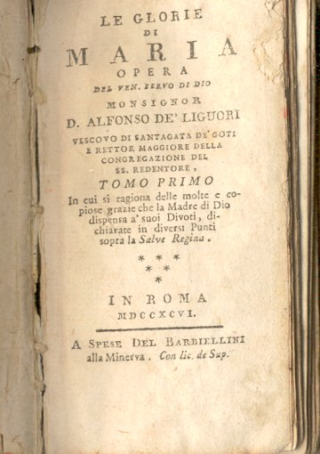 Alfonso Maria de' Liguori, Le glorie di Maria, Barbiellini alla Minerva con lic. de Sup, 1796